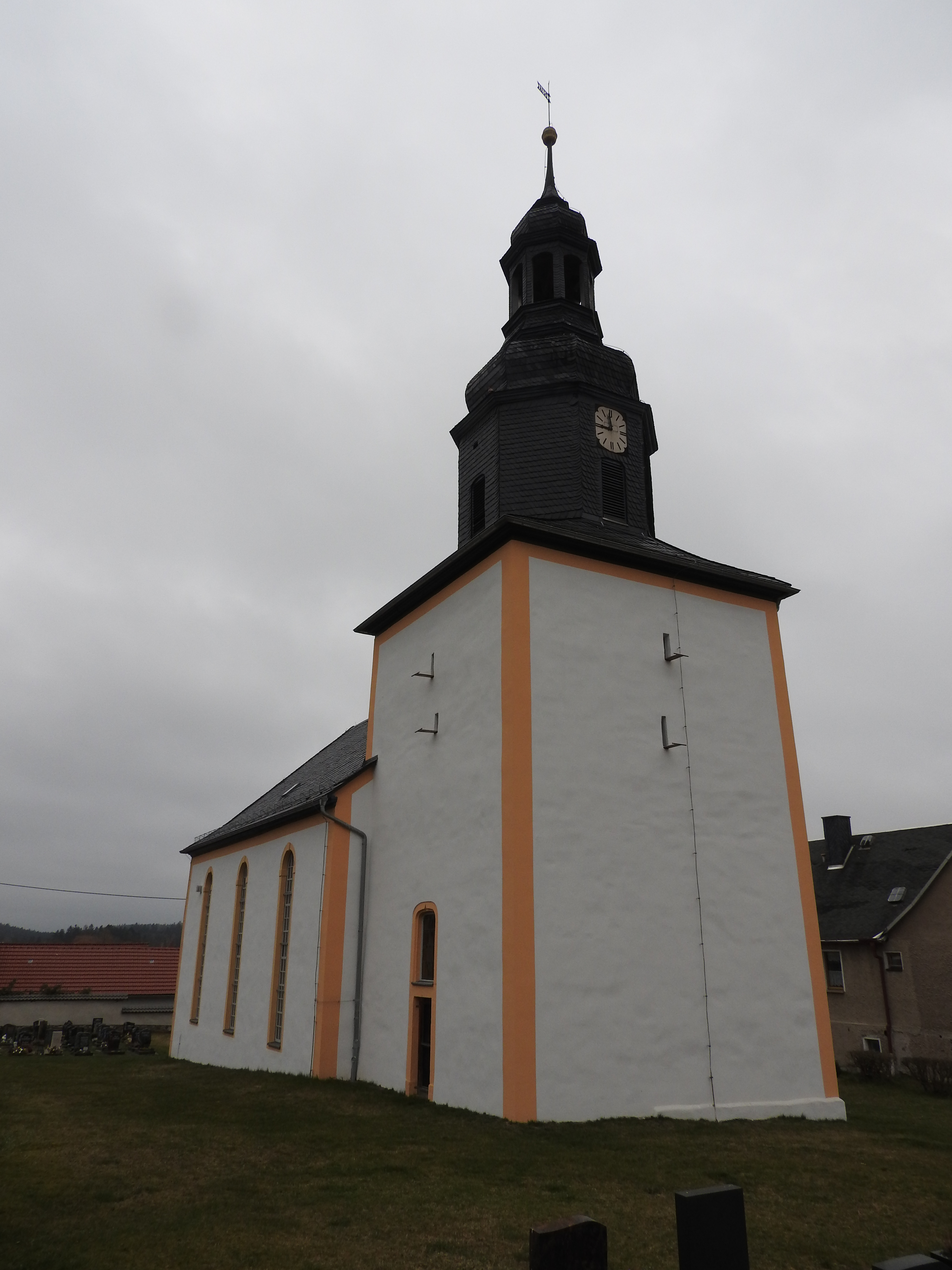 Kirche in Volkmannsdorf in Thüringen